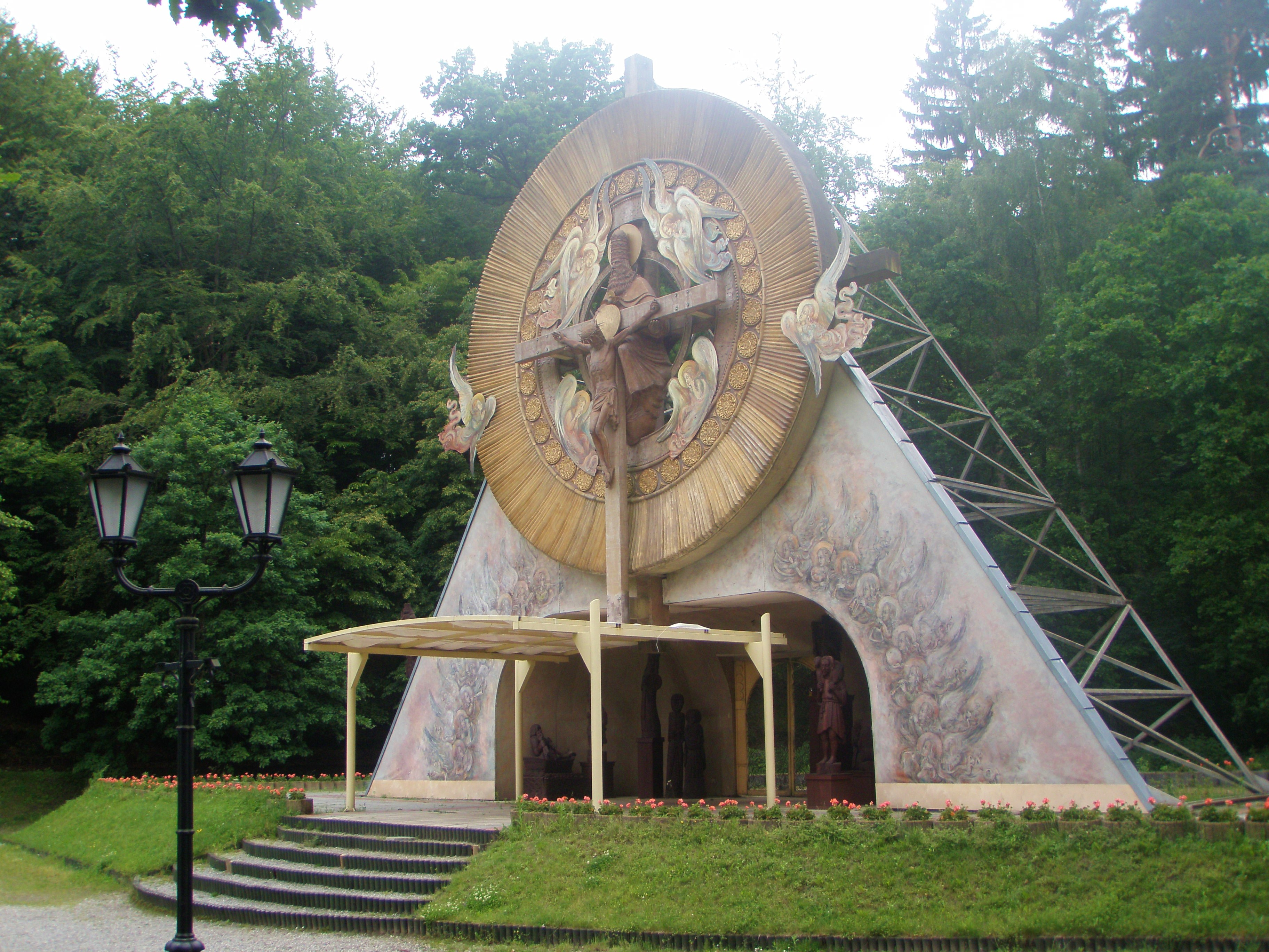 Gdańsk Matemblewo, ołtarz papieski autorstwa Mariana Kołodzieja.